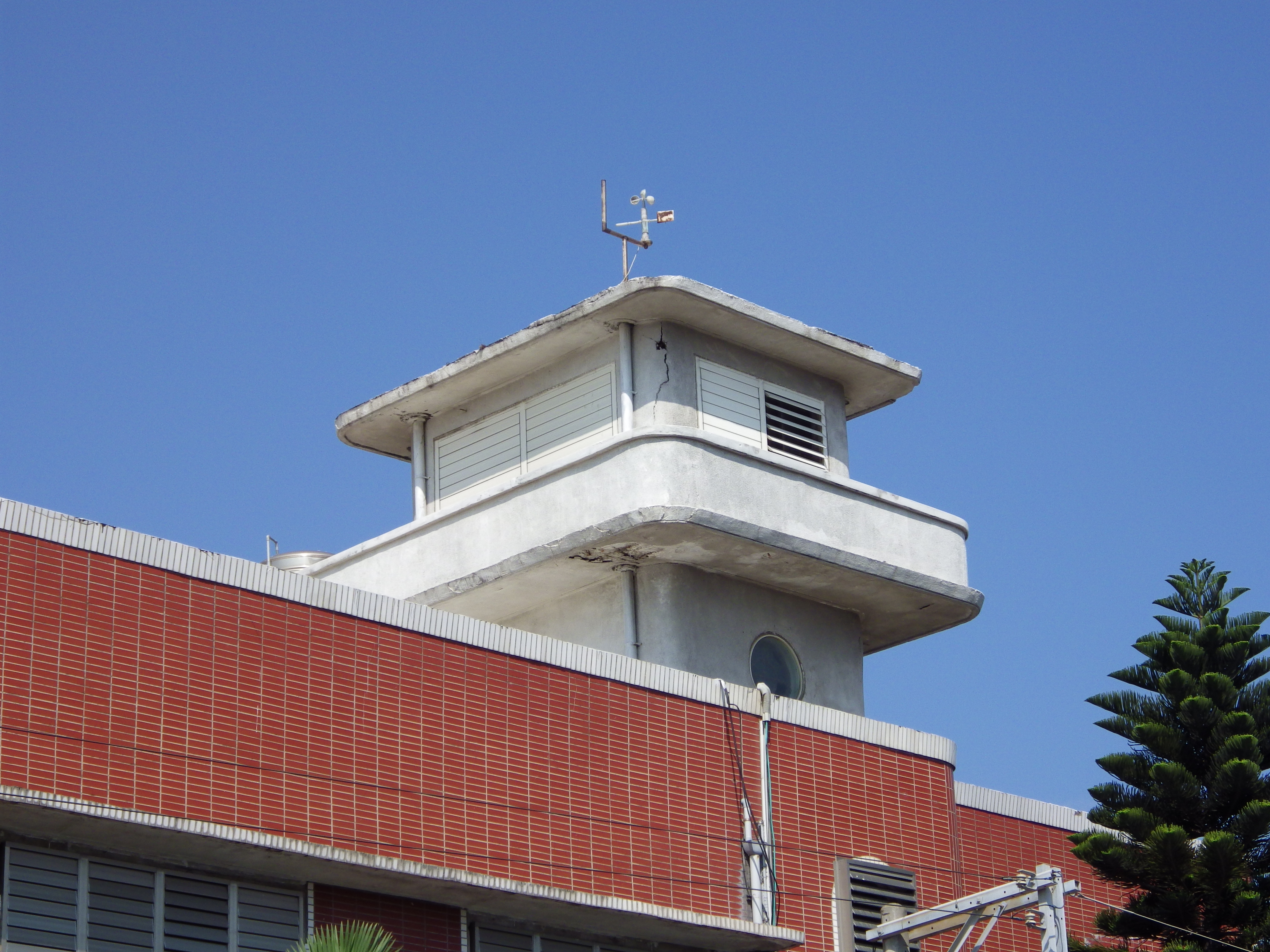 花蓮港埠頭合同廳舍